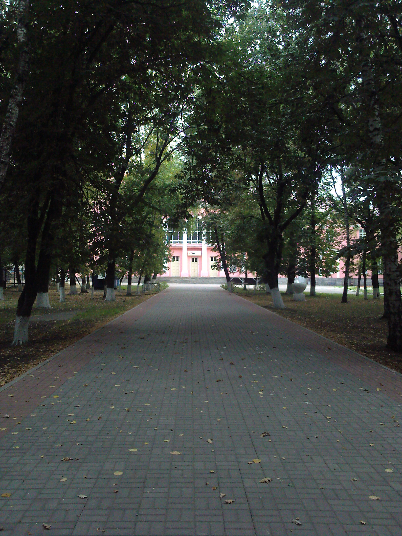 Сквер Камерного театра